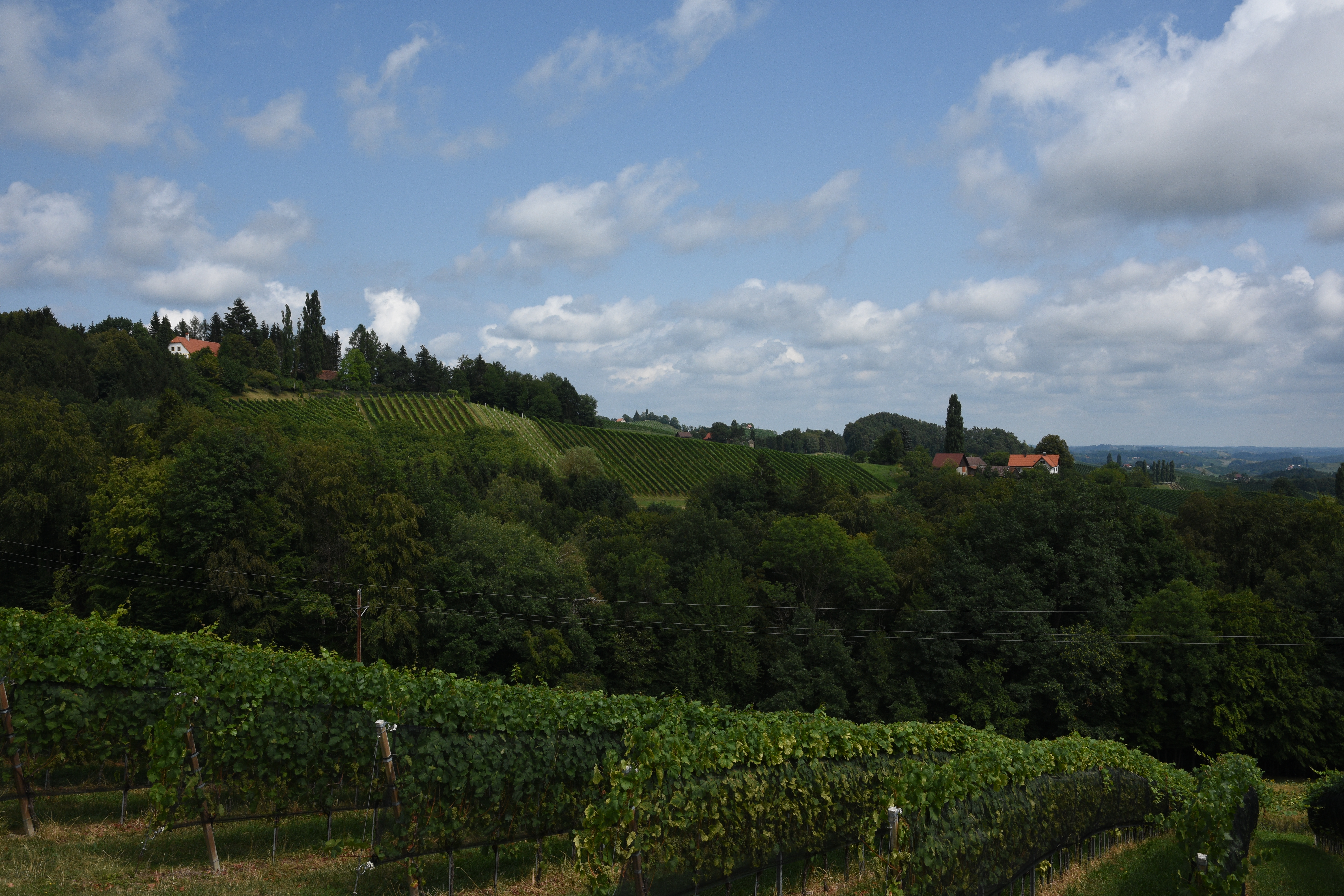 Glanz an der Weinstraße Landscape